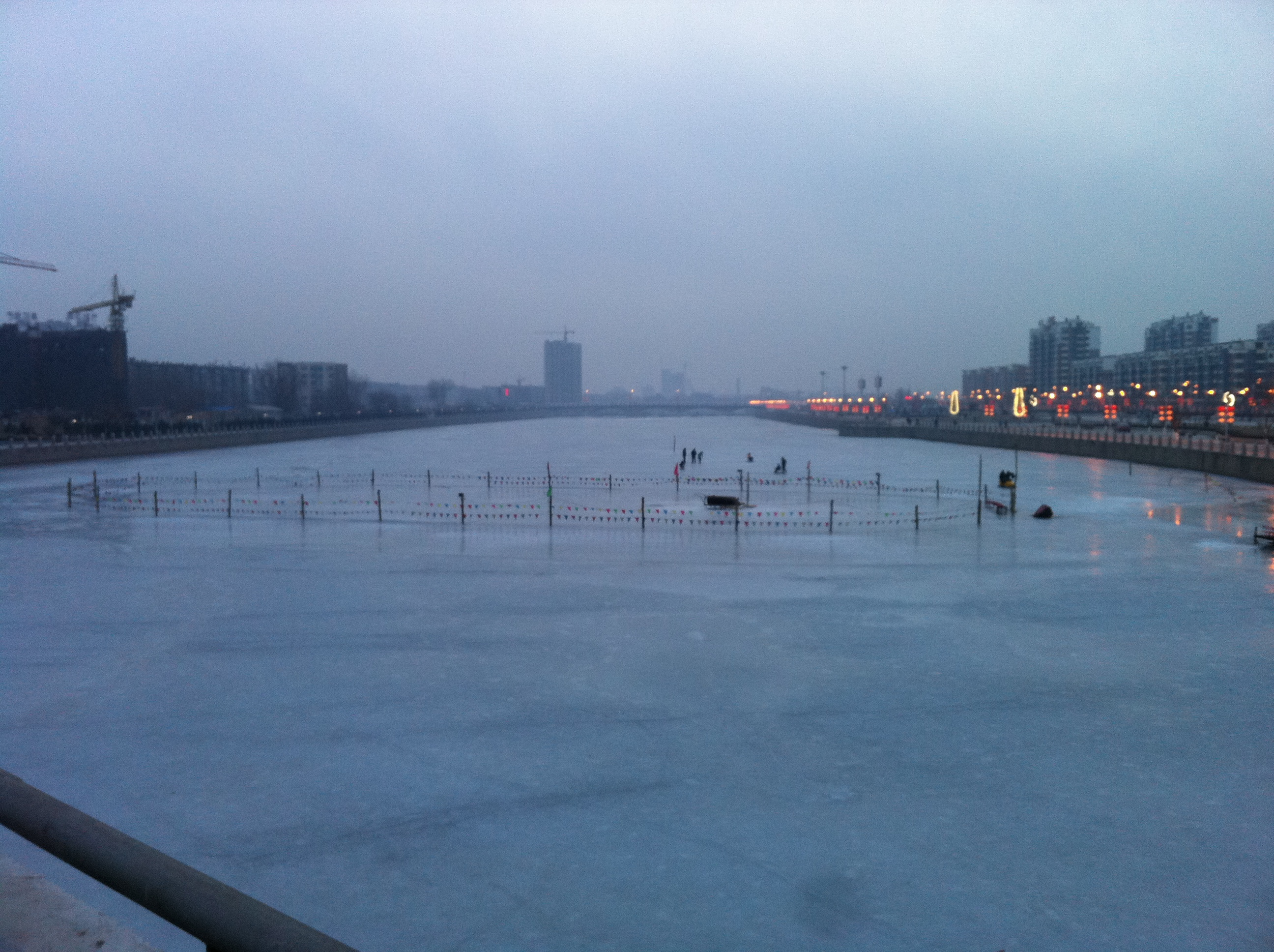 Lianshan, Huludao, Liaoning, China